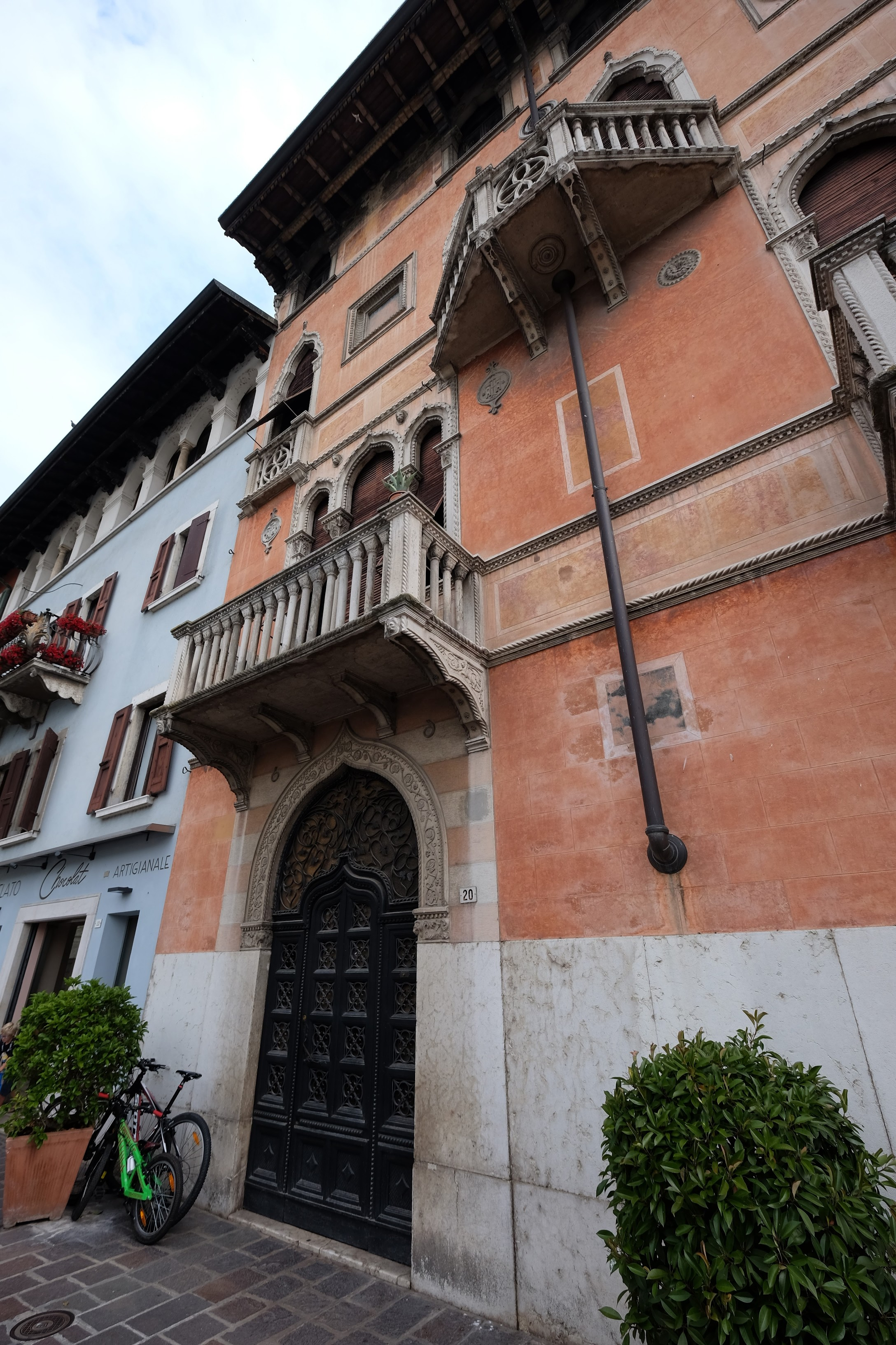 25015 Desenzano del Garda, Province of Brescia, Italy